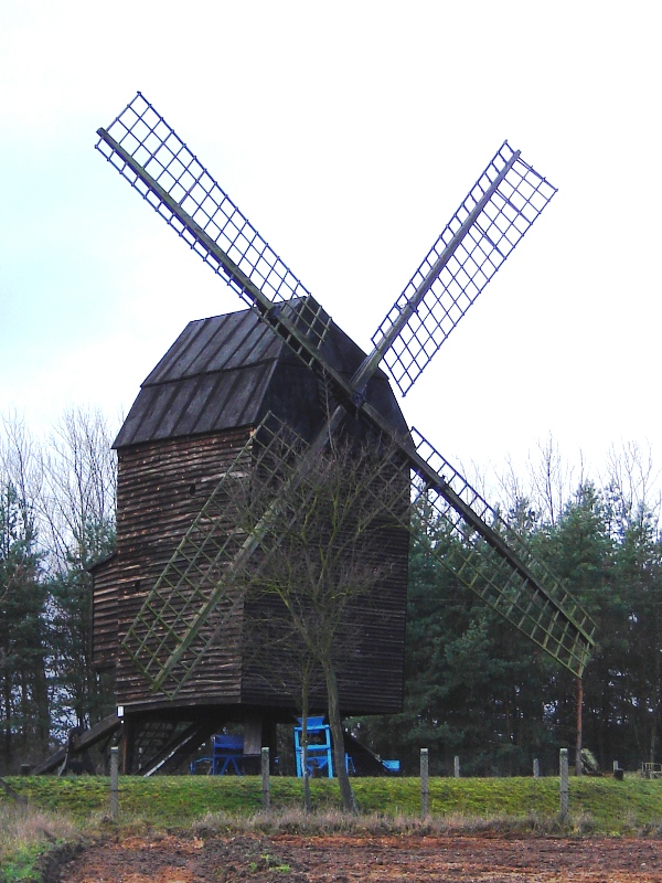 Gutshaus Parchen, Sachsen-Anhalt, Bockwindmühle